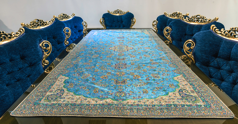 برای خرید محصولات اصیل و با کیفیت ترمه به سایت قیمت شکن مراجعه کنید